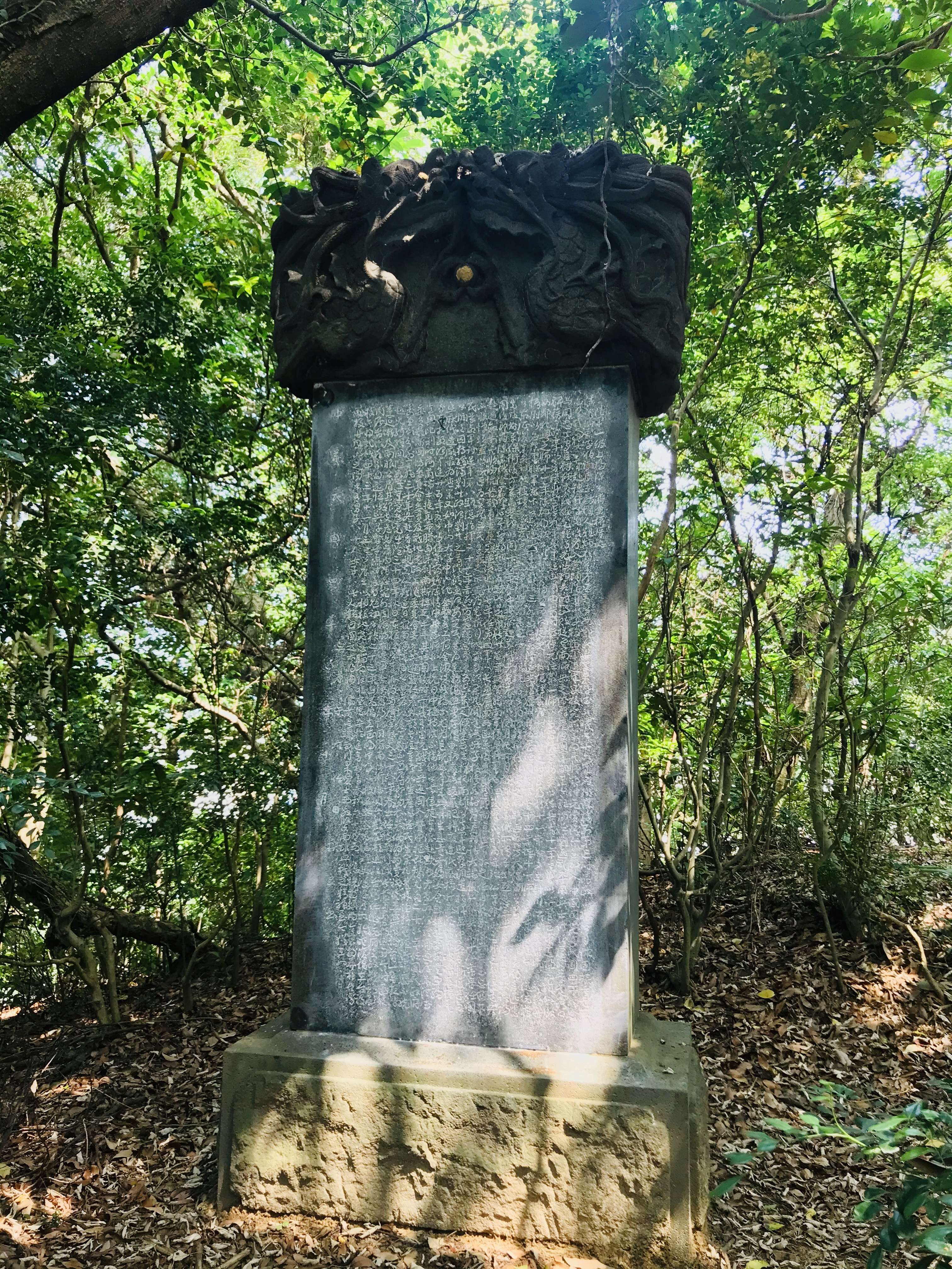 于右任書寫的陳濟棠墓誌銘